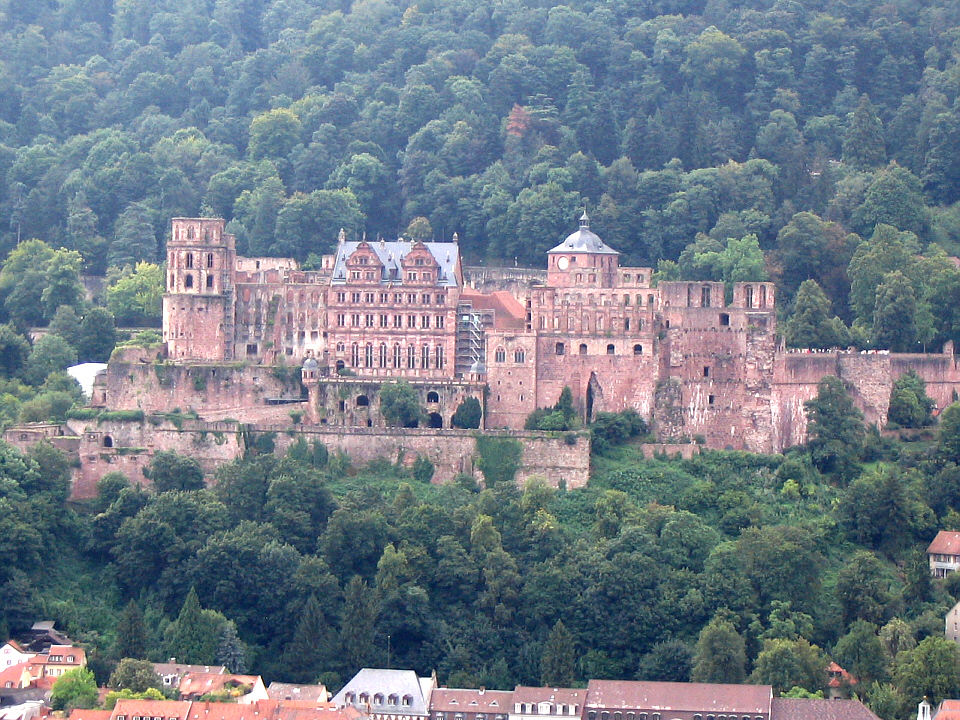 Heidelberger Schloss / Heidelberg Castle